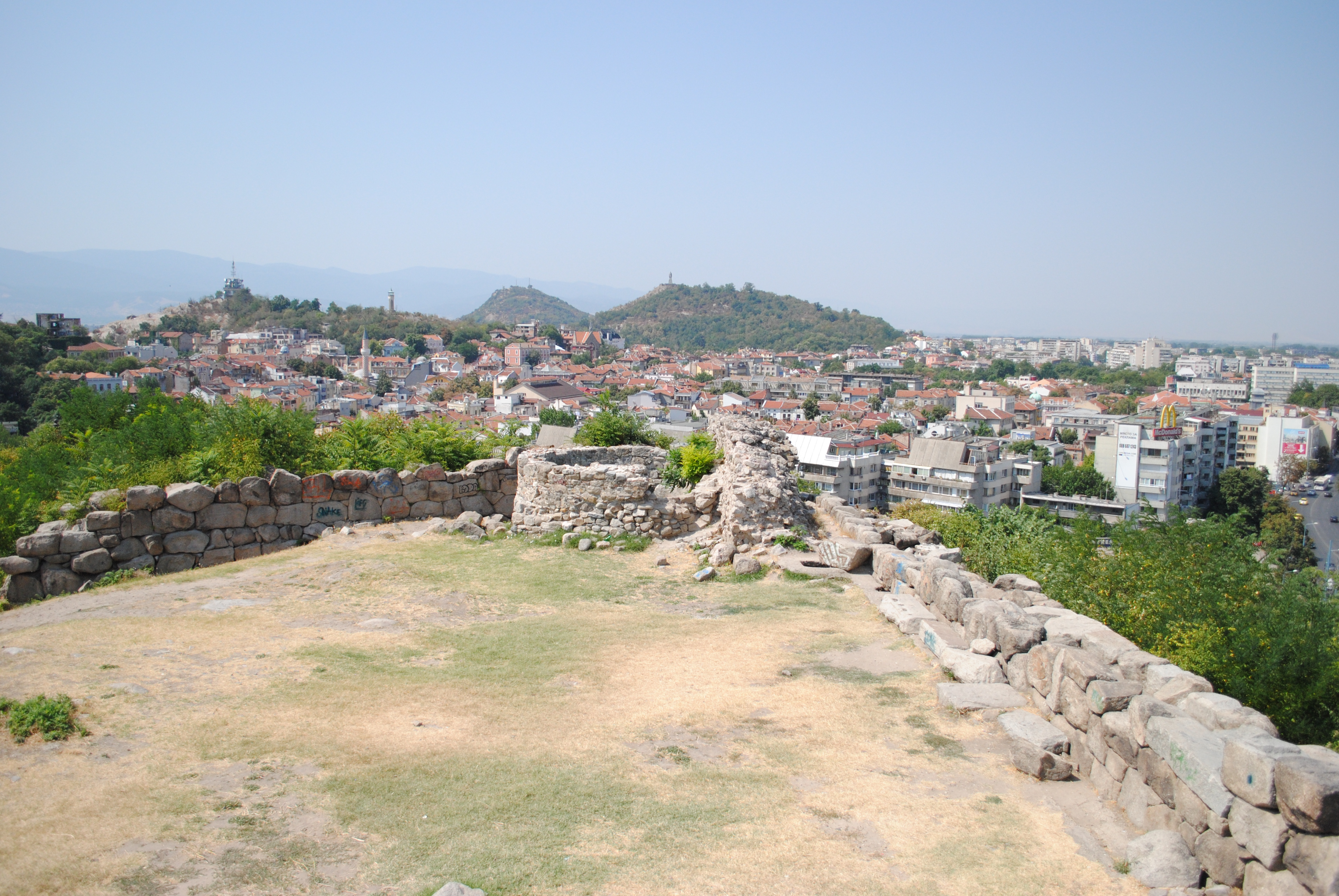 Гледка от Небет тепе, Пловдив България